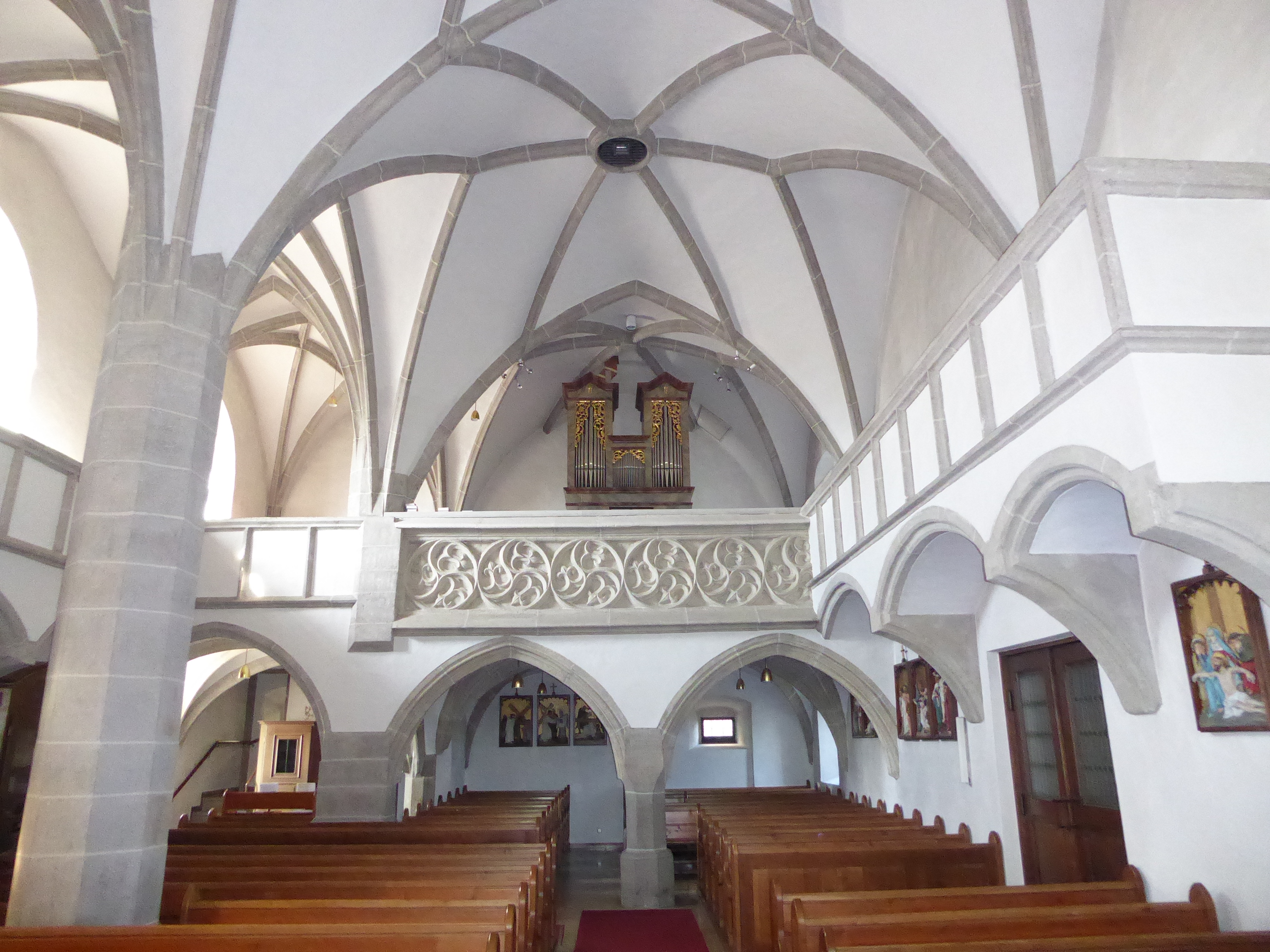 Pfarrkirche hl. Johannes der Täufer, Schlossberg 1, Arbing, Oberösterreich - umlaufende Empore